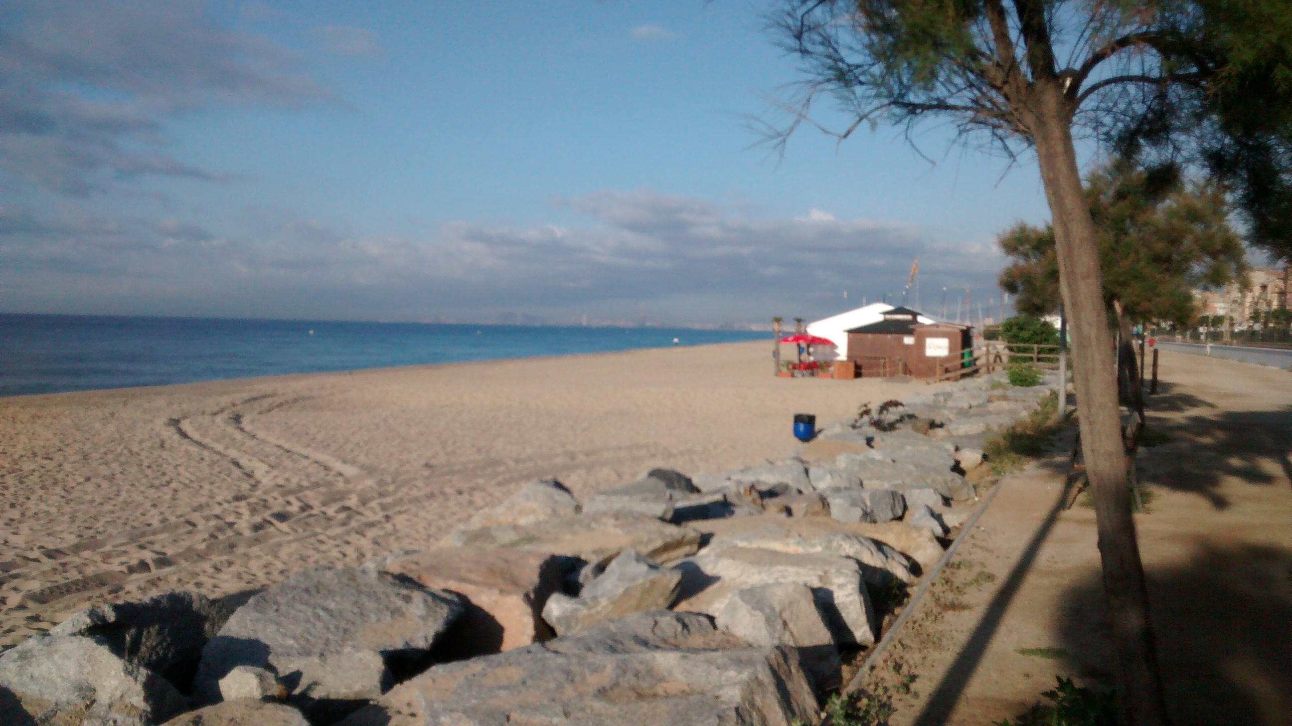 Platja d'Ocata, el Masnou This is a a photo of a beach in Catalonia, Spain, with id: PL-CT-17003-155